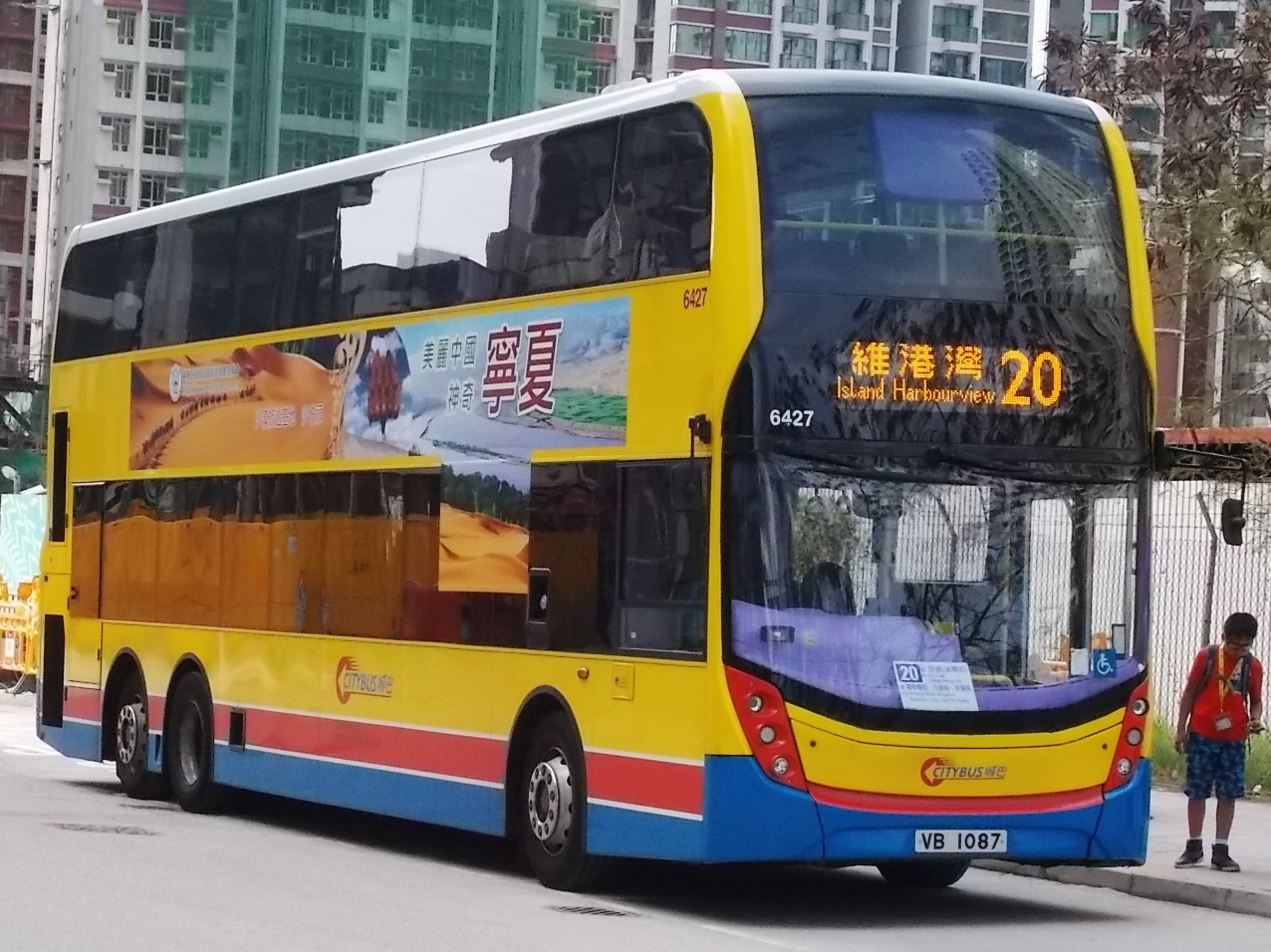 城巴20線，在啟德總站等候開出